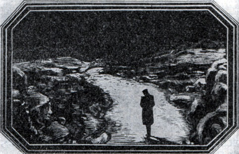 Иллюстрация А. Г. Якимченко Тушь. 1914